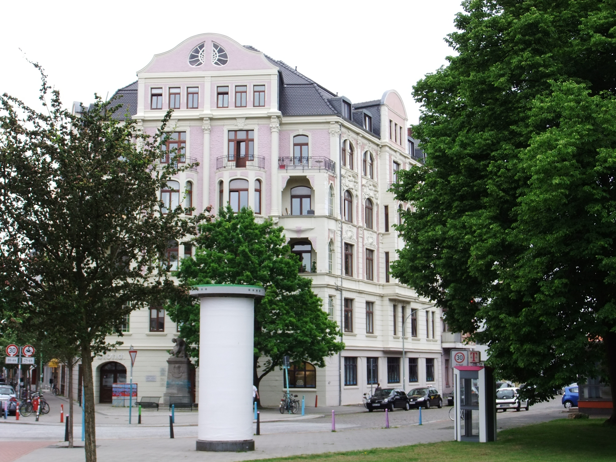 Haus des Handwerks in Bremerhaven, Bürgermeister-Smidt-Straße 133.Das abgebildete Objekt ist ein geschütztes Kulturdenkmal in der Freien Hansestadt Bremen, mit der Nr. 1531 beim Landesamt für Denkmalpflege registriert.